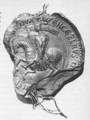 Pečeť Václava I